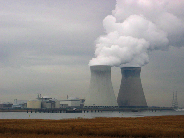 Kerncentrale Doel gezien vanop de rechteroever van de Schelde